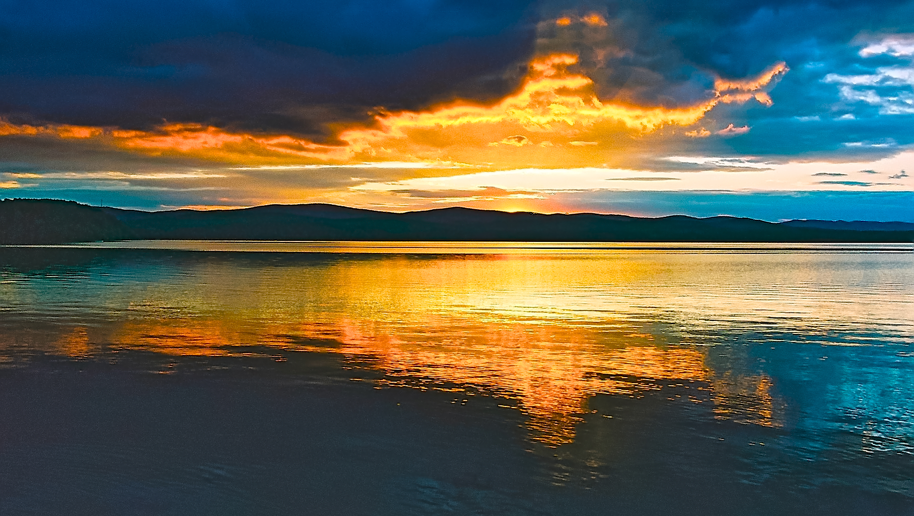 Озеро Большой Кисегач: Чебаркульский район, Челябинская область This image is related to the protected area of Russia number 7410302